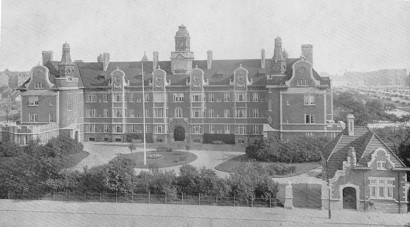 Dahlgrenska stiftelsen i Malmö. Invigt 1903. Arkitekt Axel Anderberg